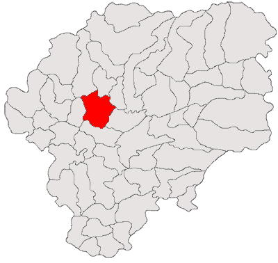 Categorie:Hărţi ale judeţului Bistriţa-Năsăud